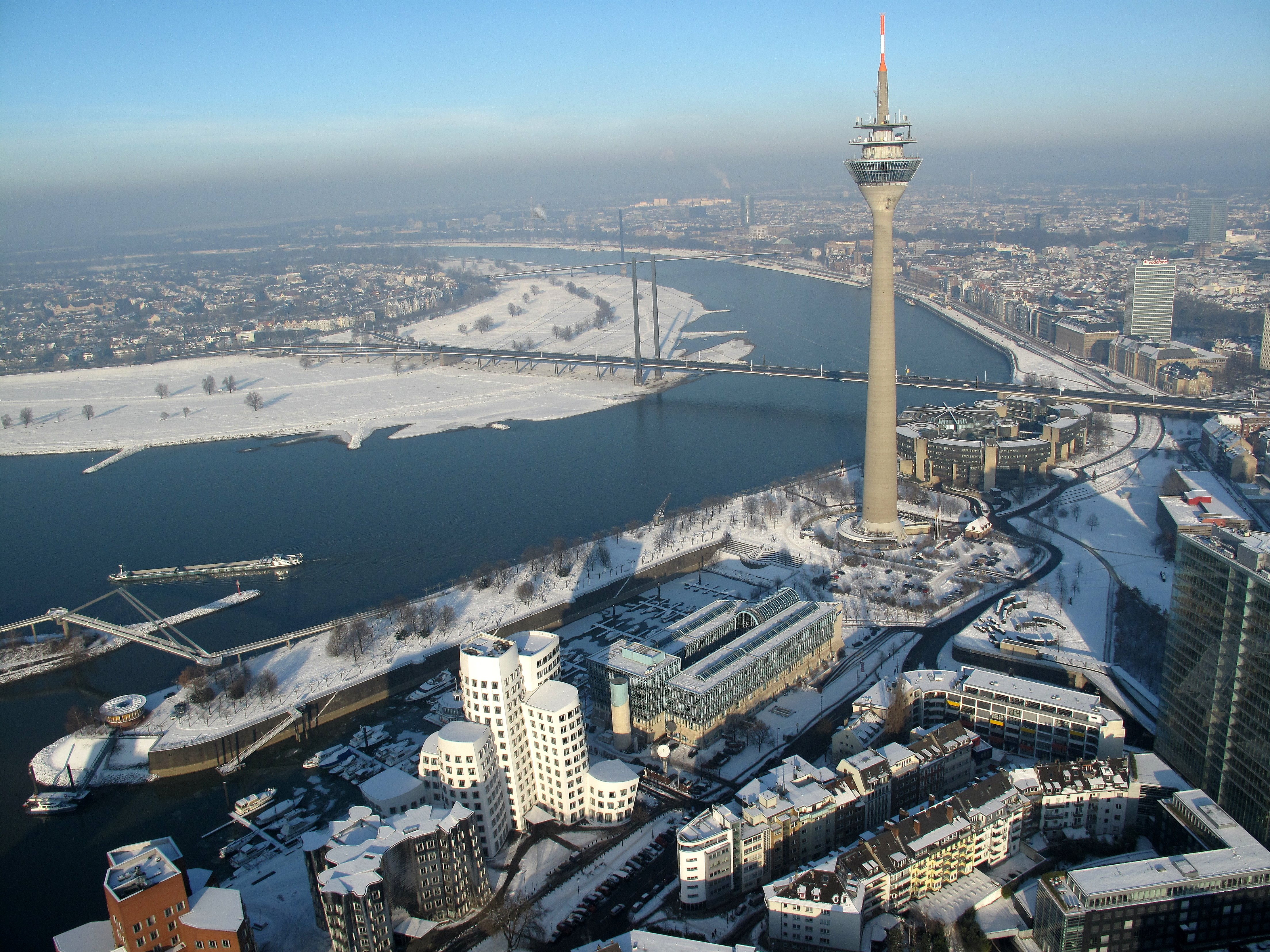 Düsseldorf, Marina Düsseldorf